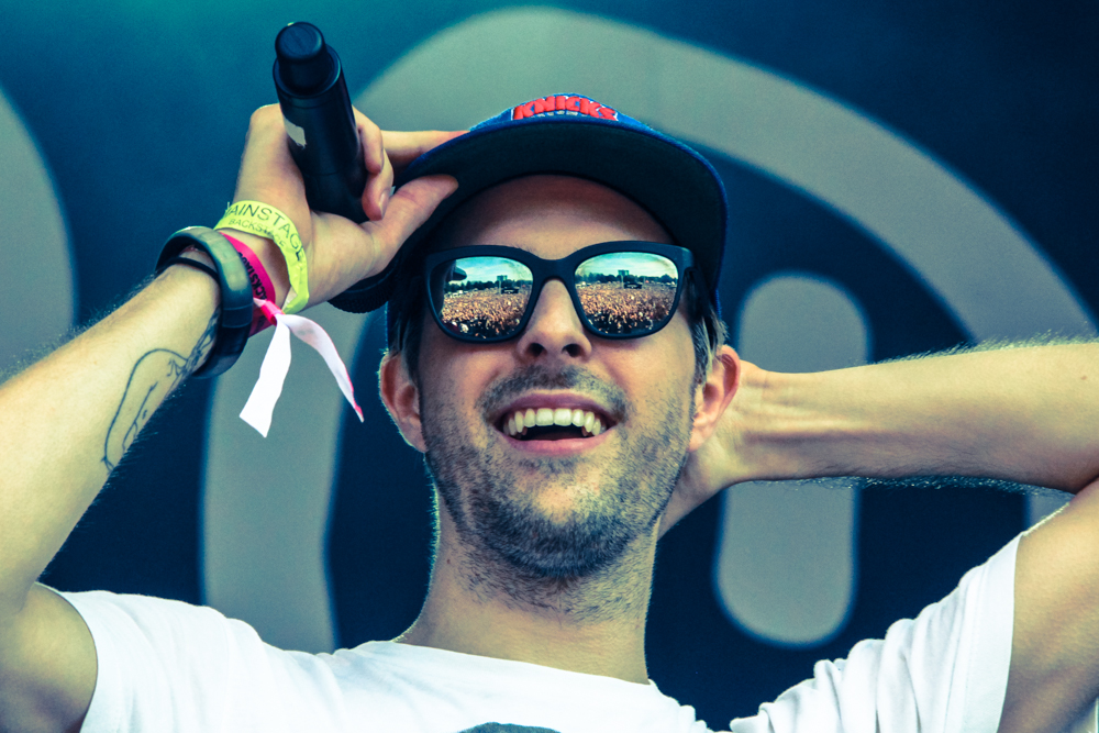 Juicy Beats Festival